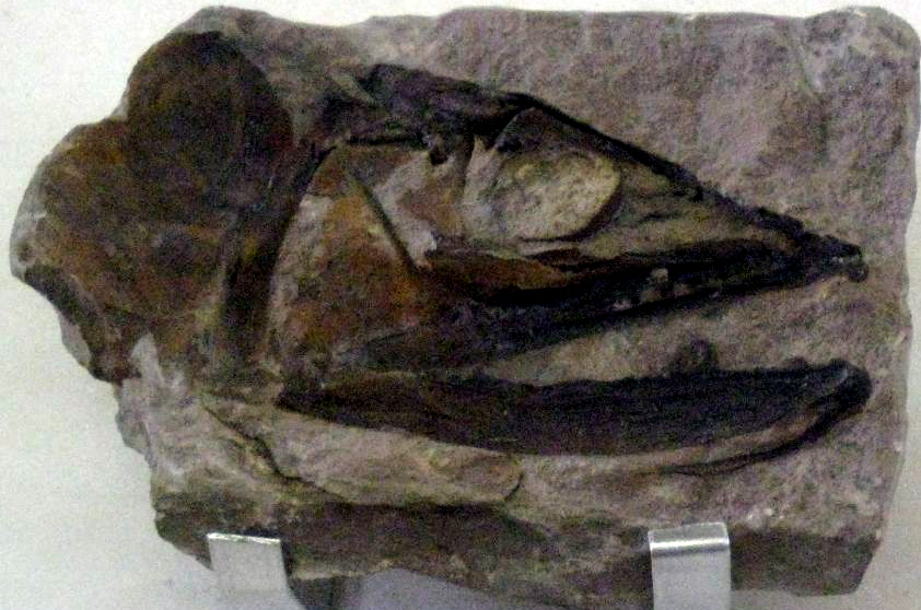 Halec laubei, Narodni Muzeum